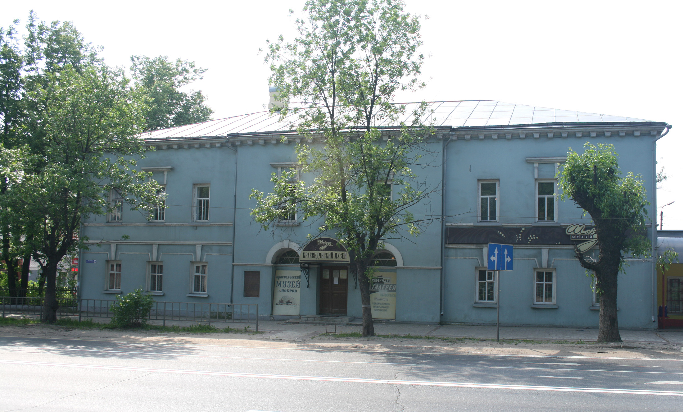 Краеведческий музей города Покрова.